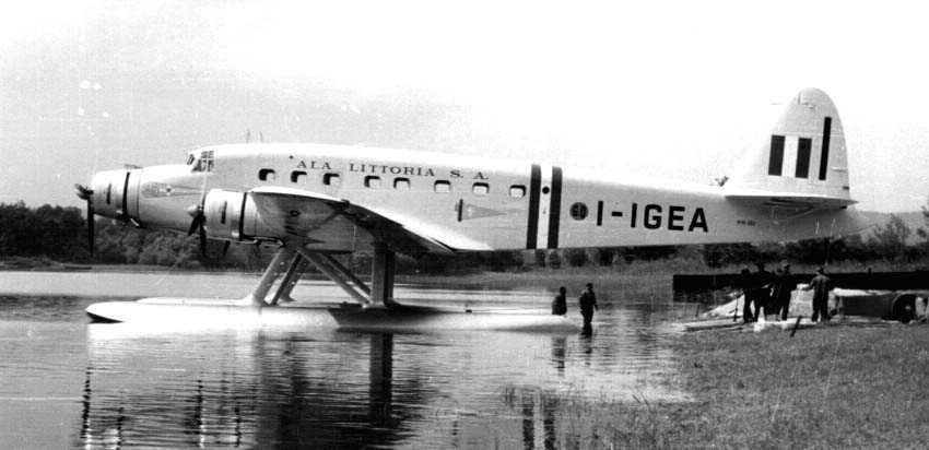 Savoia Marchetti S.M.87